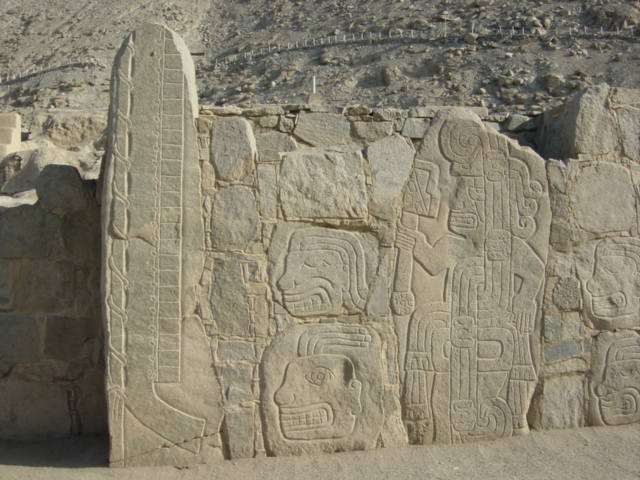 Sechin Tempelruine bei Casma